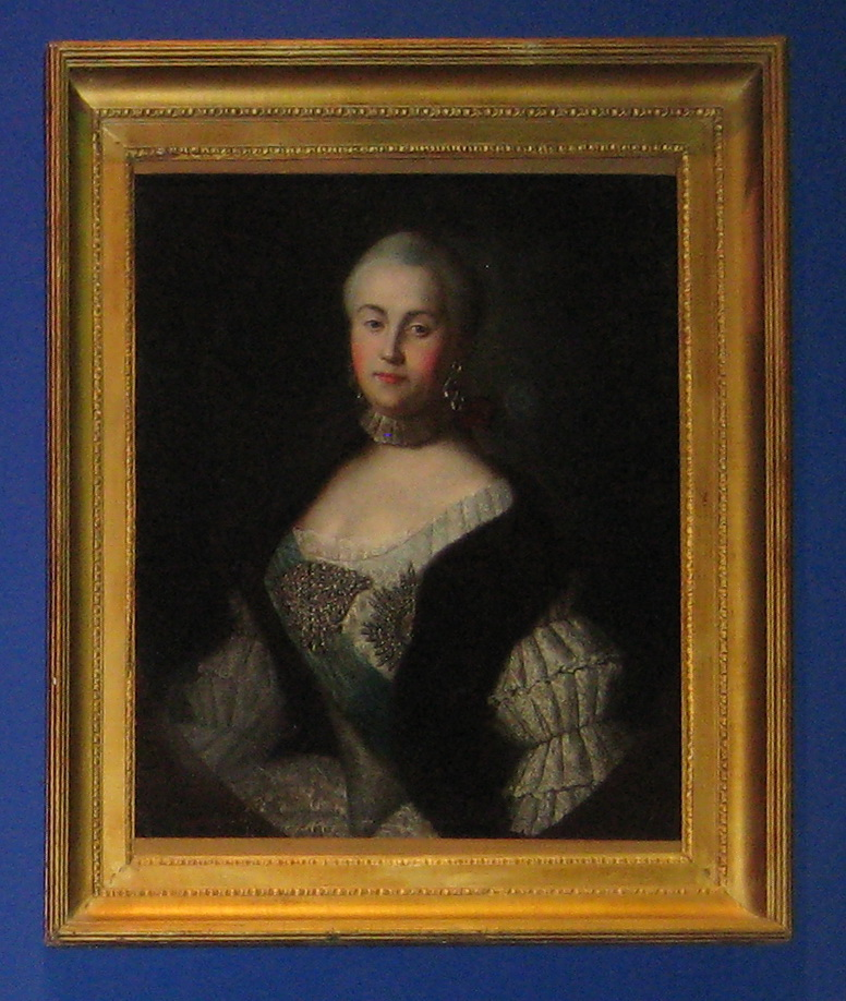 Неизвестный художник второй половины 18 века «Портрет Екатерины II» Тип Ротари. Начало 1760-х